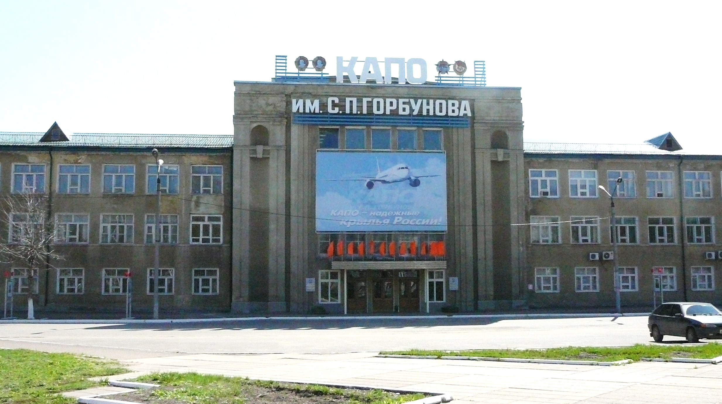 Административное здание КАПО им. С. П. Горбунова (г. Казань).